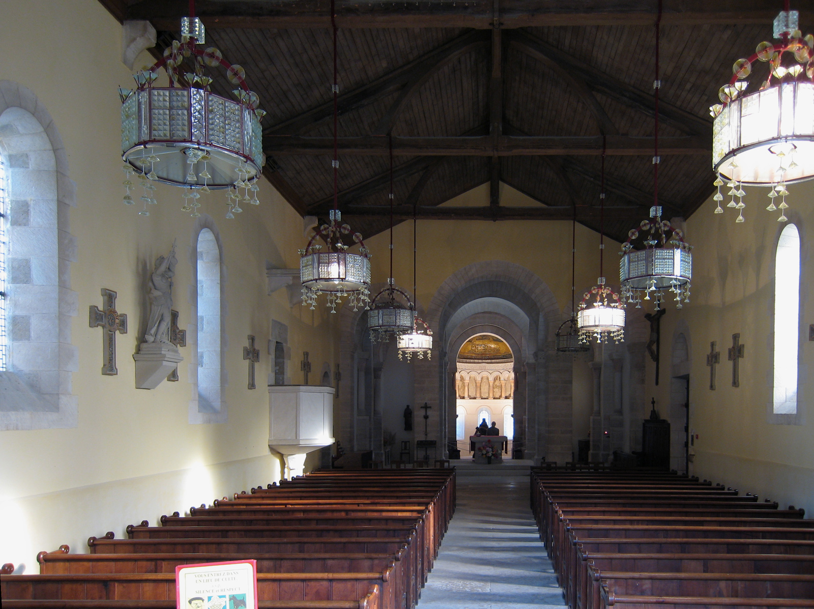 Basilica Germigny Des Prés